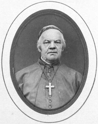 Bischof Eduard Jakob Wedekin, 1870, I. Vaticanum